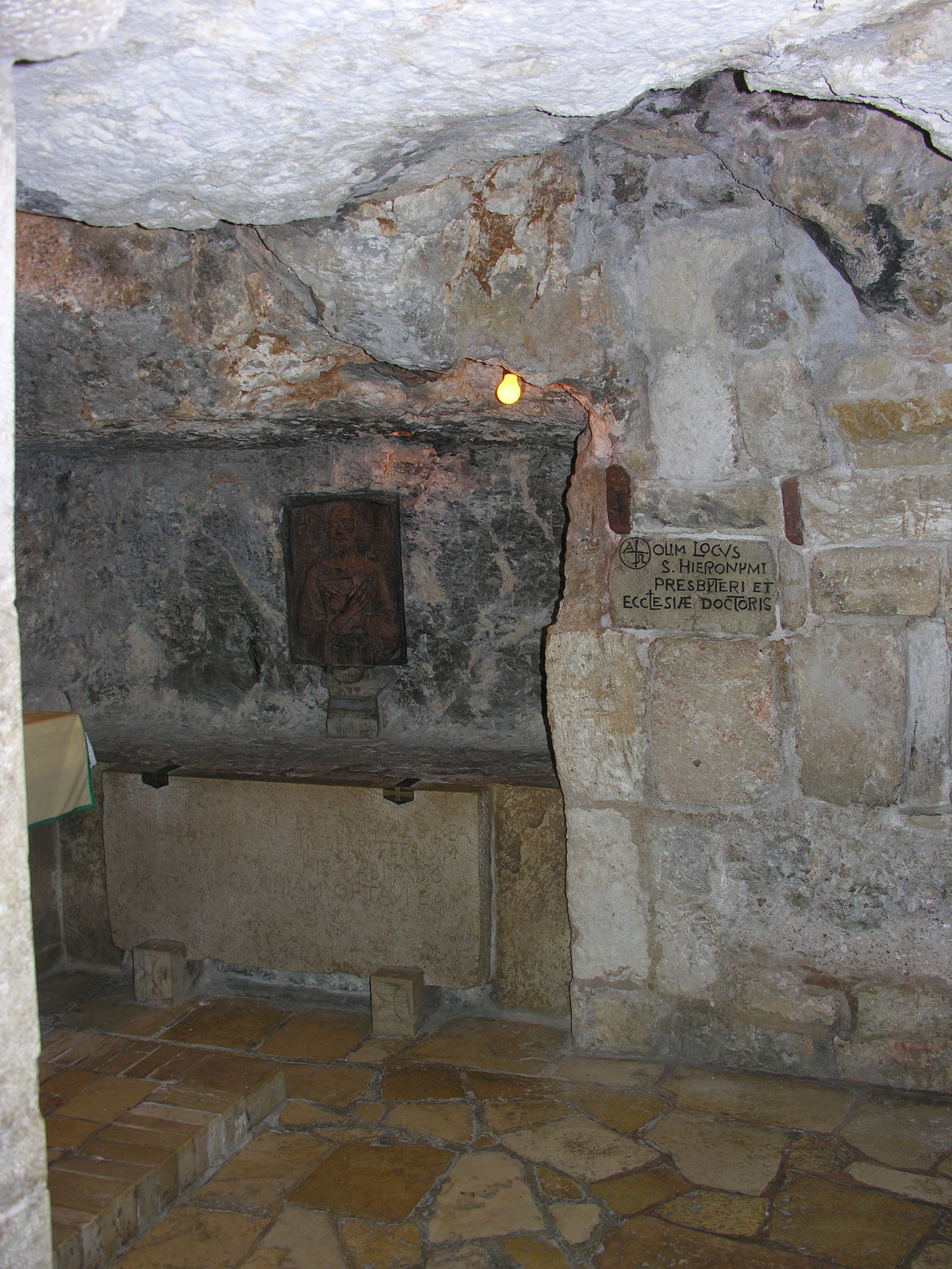 Grotte de saint Jérôme, basilique de la Nativité à BethléemLatina: Olim locus S. Hieronymi presbyteri et Ecclesiae doctoris, Bethleem